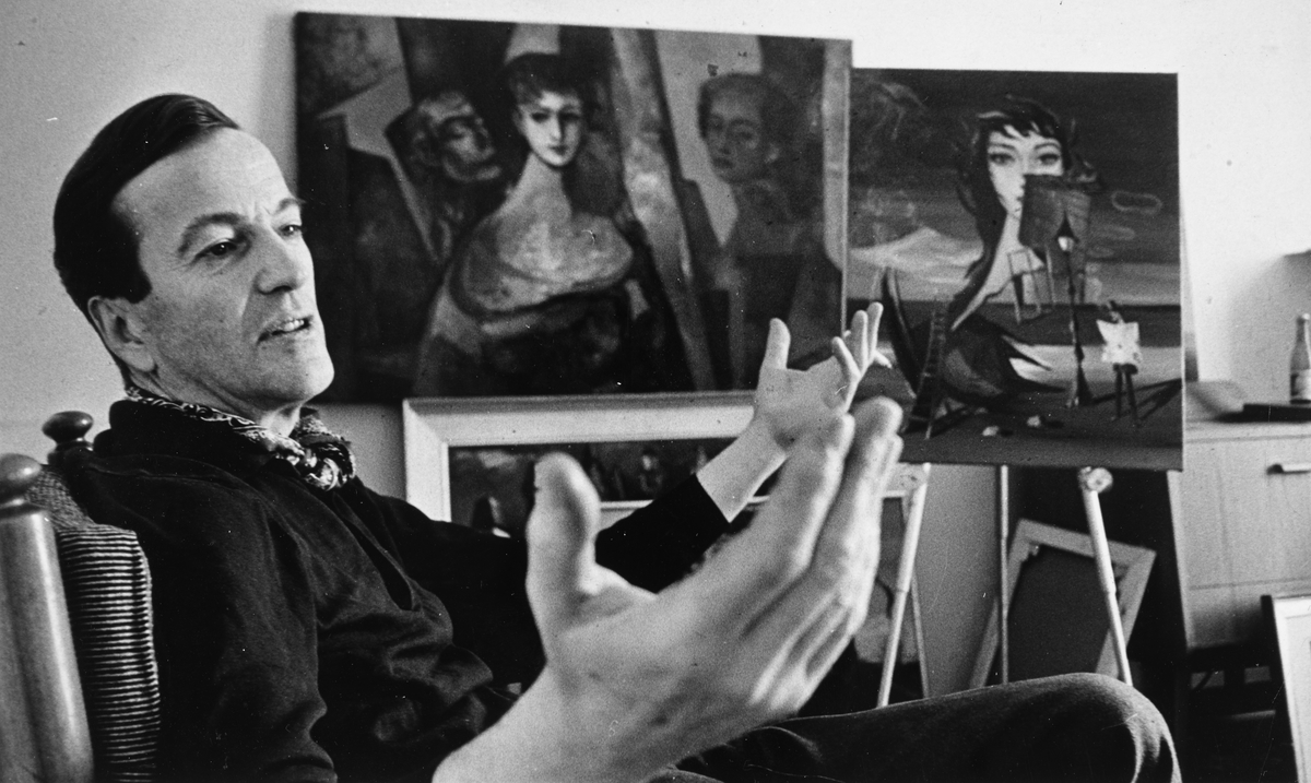 Johan Christian Castberg 23. mars 1962